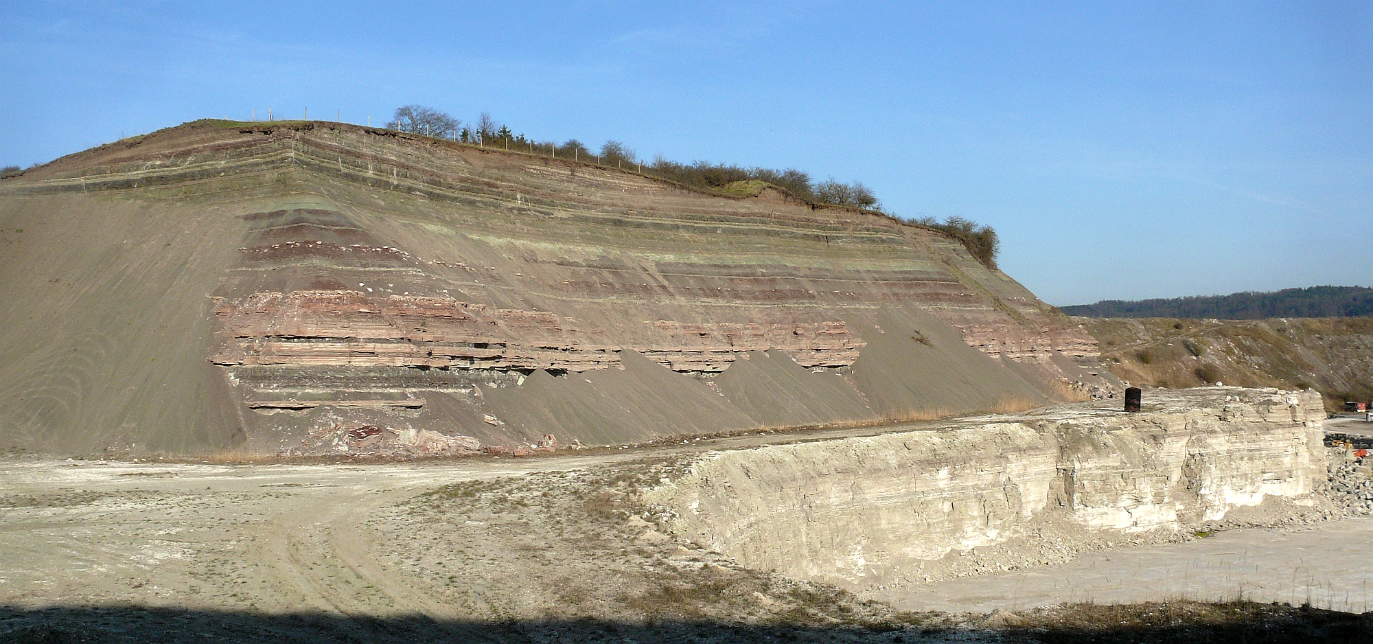 Grabfeld-Formation:- Mittlerer Gipshorizont- Bleiglanzhorizont mit Bleiglanzbank- Dunkelrote Mergel mit Quarzitbank- Bochinger Horizont mit Bochinger Bank- GrundgipsGipsbruch am Äulesberg, Vellberg